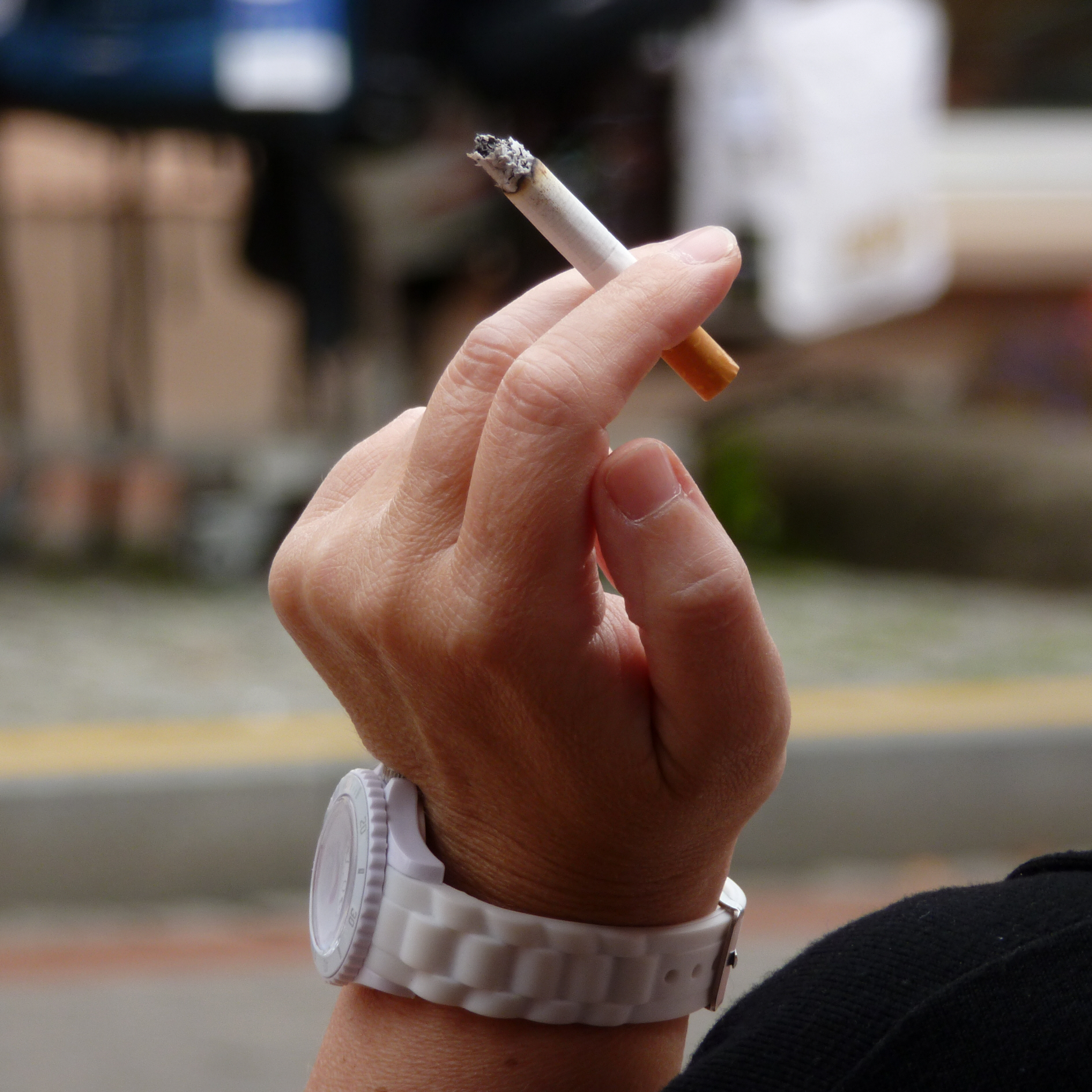 Die Hand einer Frau in einem Straßencafe hält entspannt eine Zigarette. Straßenfotografie in der Marktstraße von Soltau, DE.